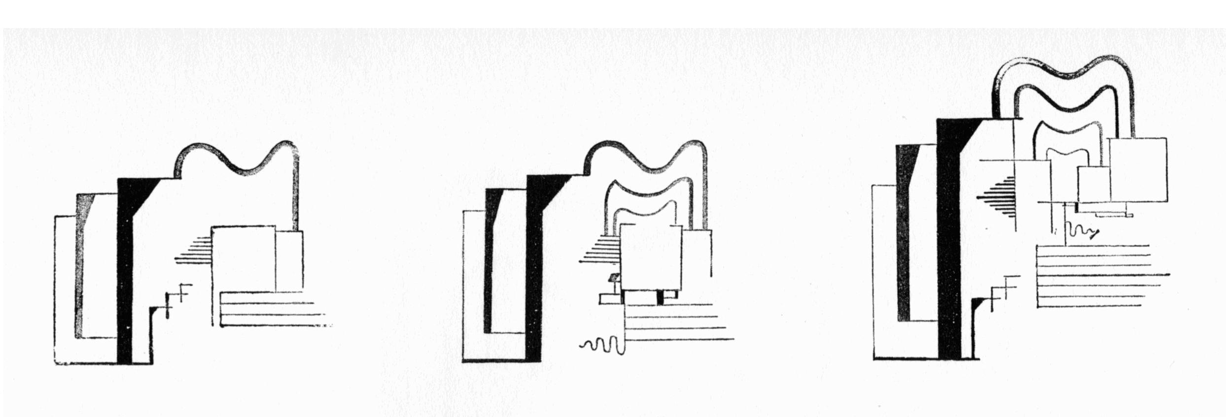 Viking Eggeling. Drei momente des Horizontal-Vertikalorchesters. c 1921. From De Stijl, vol. 4, nr, 7 (July 1921): facing p. 112.